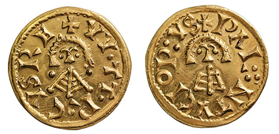 Reproducción moderna (siglo XX) de un tremis visigodo de oro acuñado en Palantucio durante el reinado de Witerico. Leyendas: anverso "+VV.TT.R.CVS RE", reverso "+PAL.:NTVCIO P:VS". Fuente: Ruth Pliego, La Moneda Visigoda, 2009, 969. Conservación: EBC+.